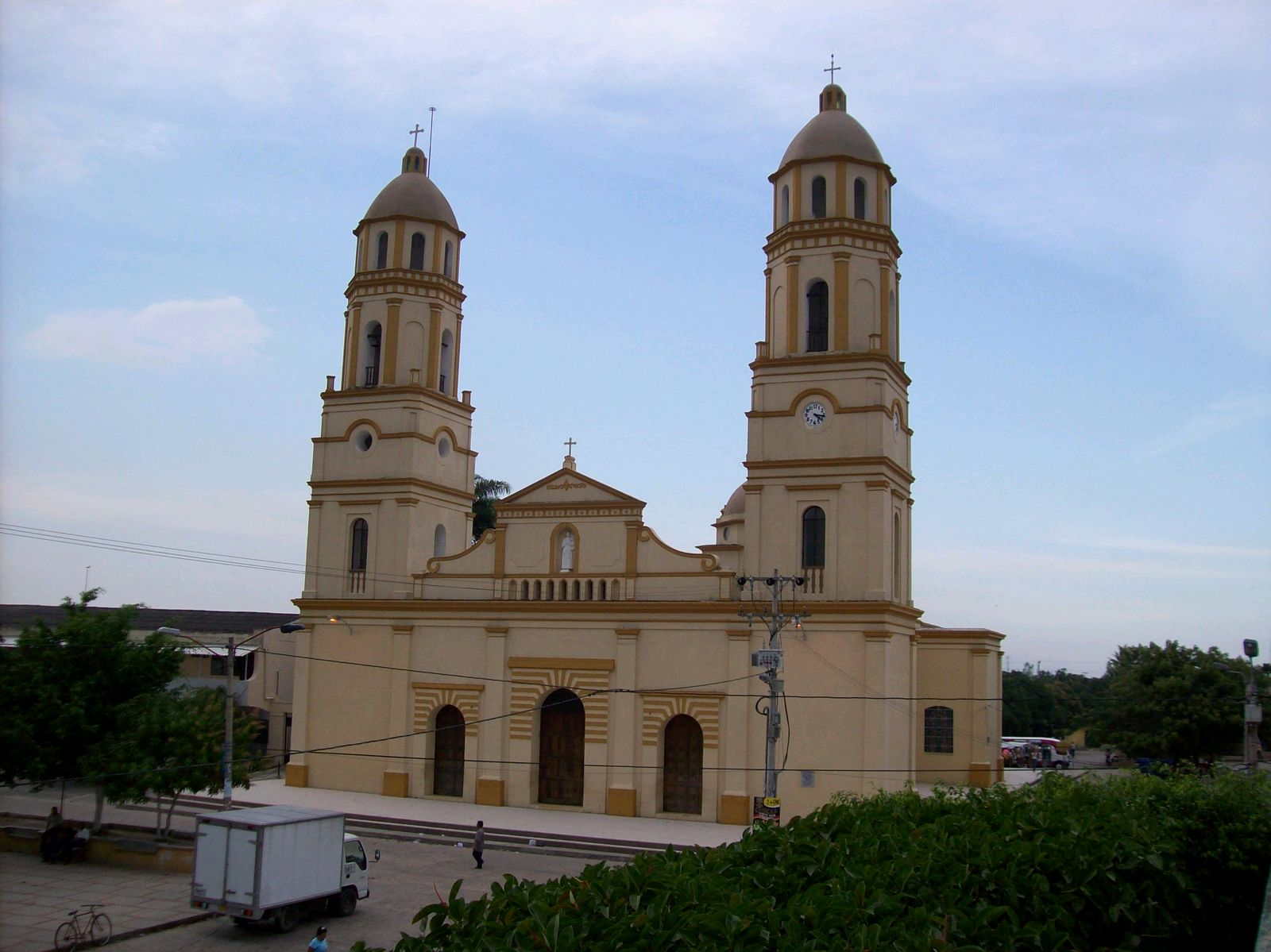 Panorámica de la iglesia central de San Antonio de Padua, Sabanalarga Atlántico. Foto tomada desde el edificio de la alcaldia municipal.